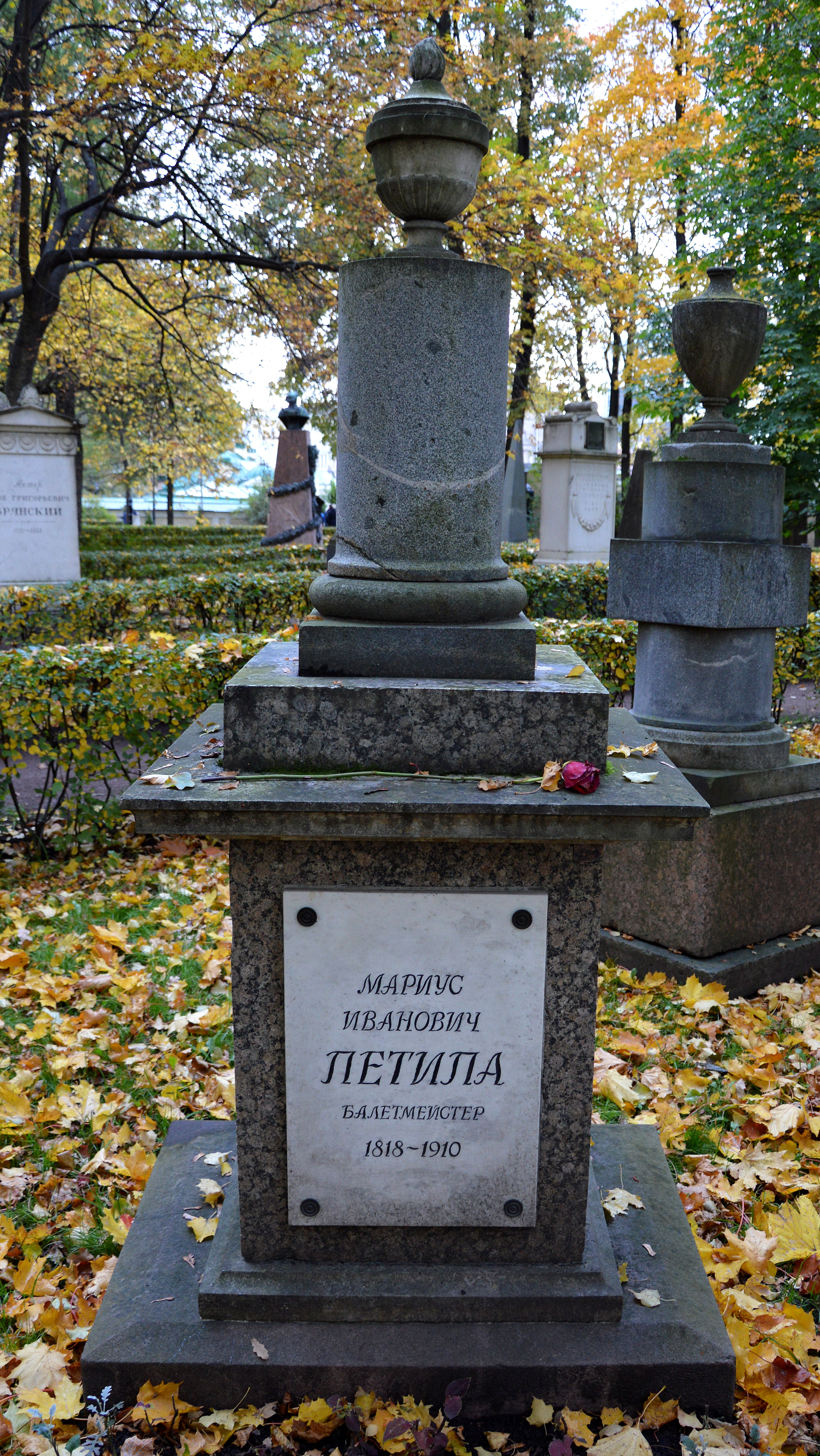 Grabmal Petipa in Sankt Petersburg